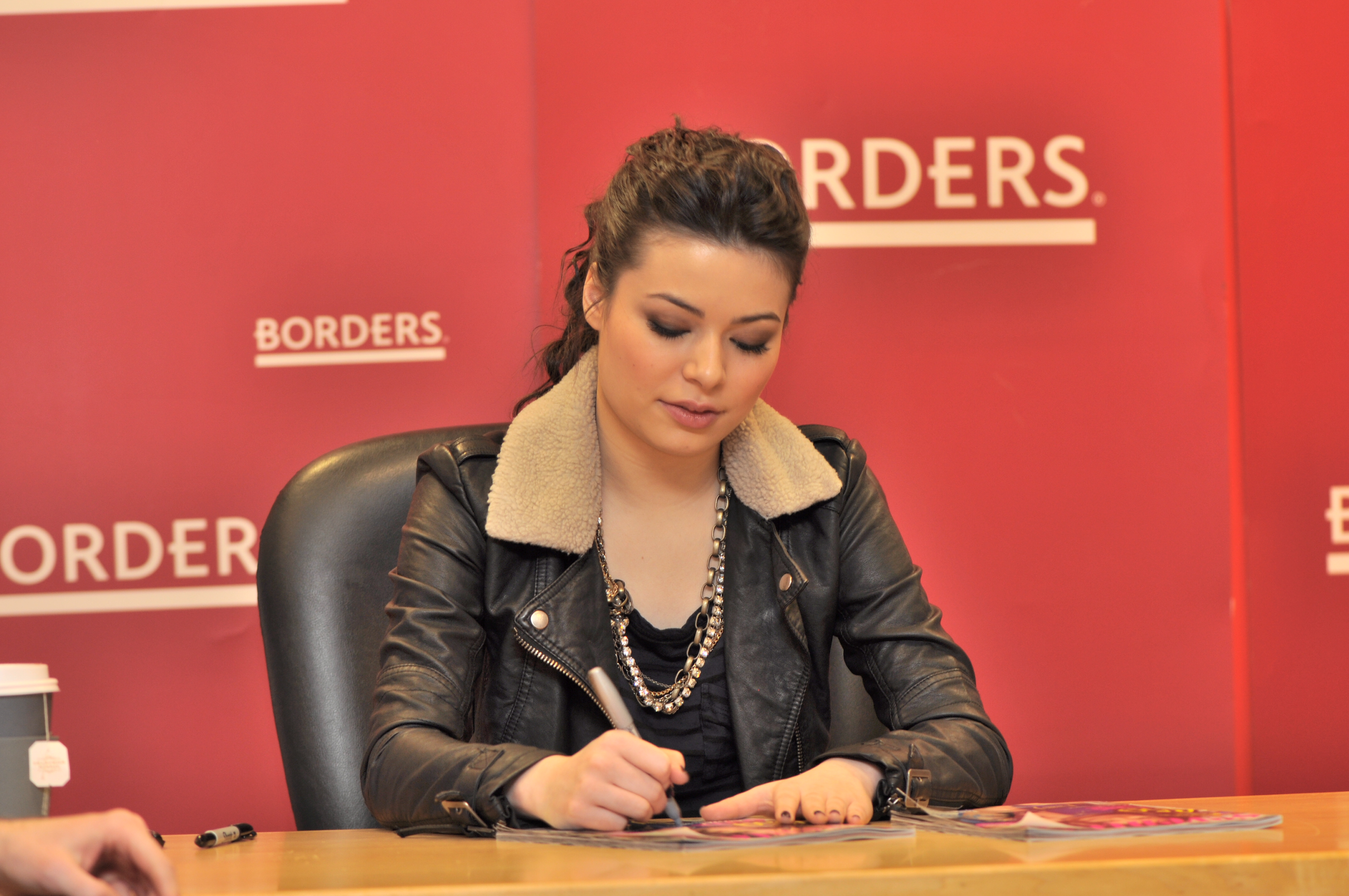 Cosgrove during a Borders magazine signing, in February 2011. Nikon D90 + Nikon 105mm f/2.8 VR